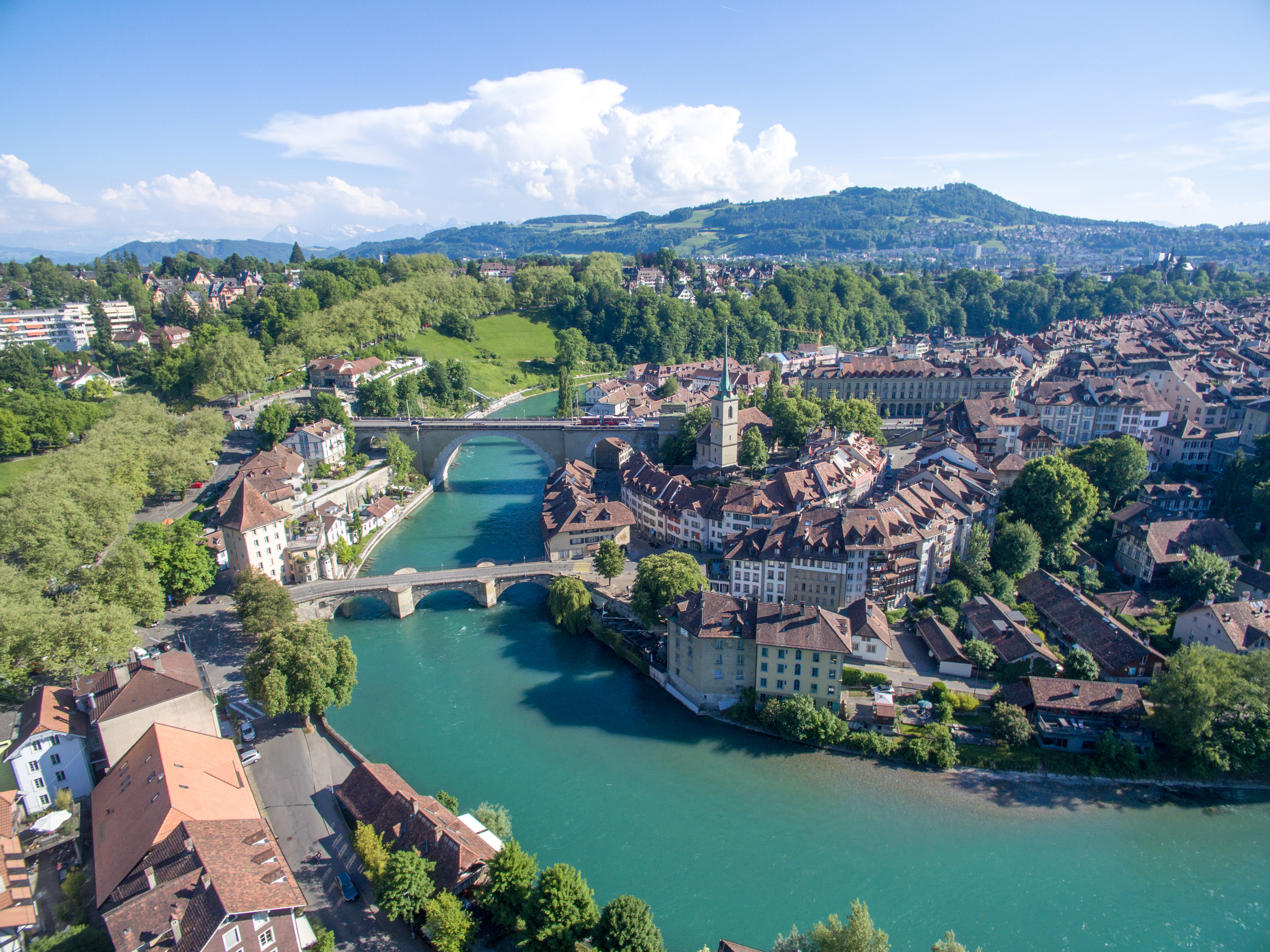 Bern 007